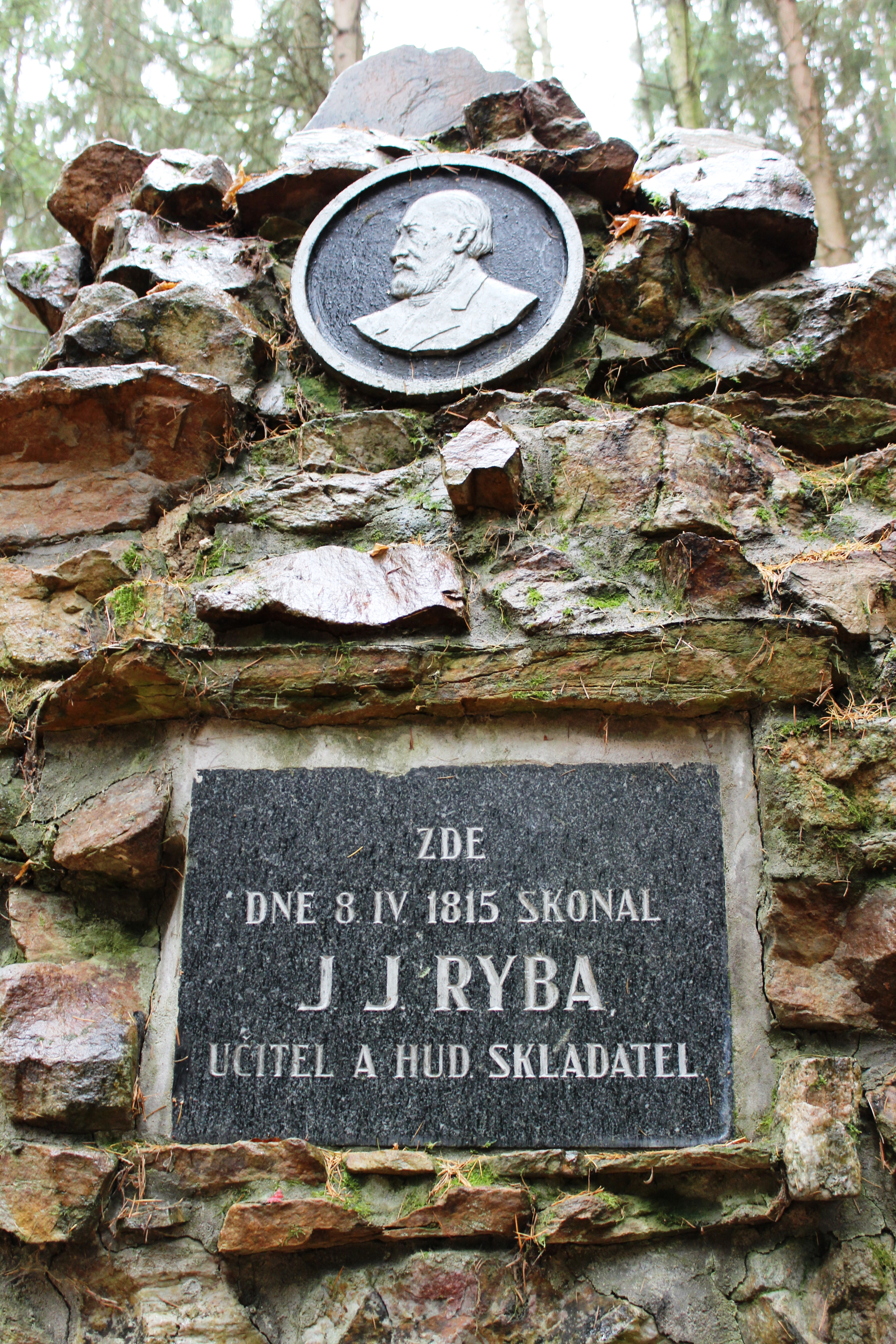 Mohyla Jakuba Jana Ryby v lese Na Štěrbině. Voltuš (Rožmitál pod Třemšínem). Okres Příbram. Česká republika.